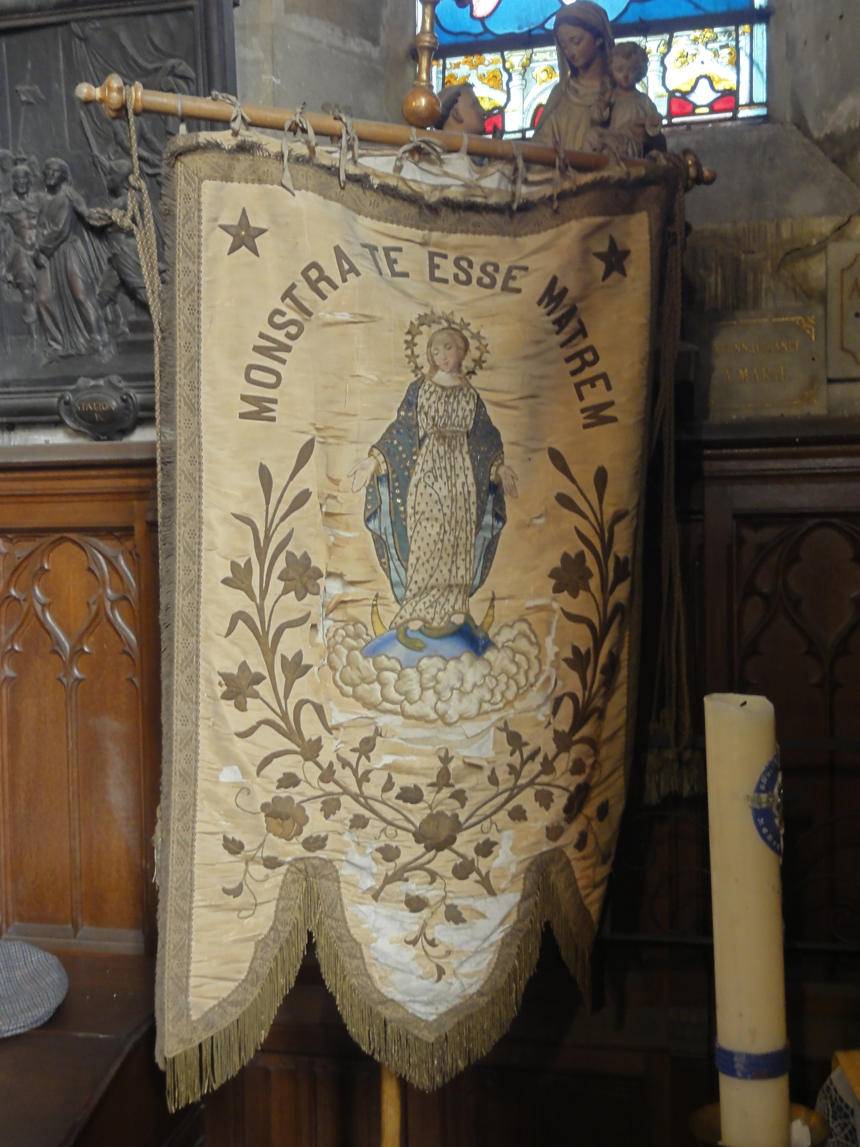 Voir titre.